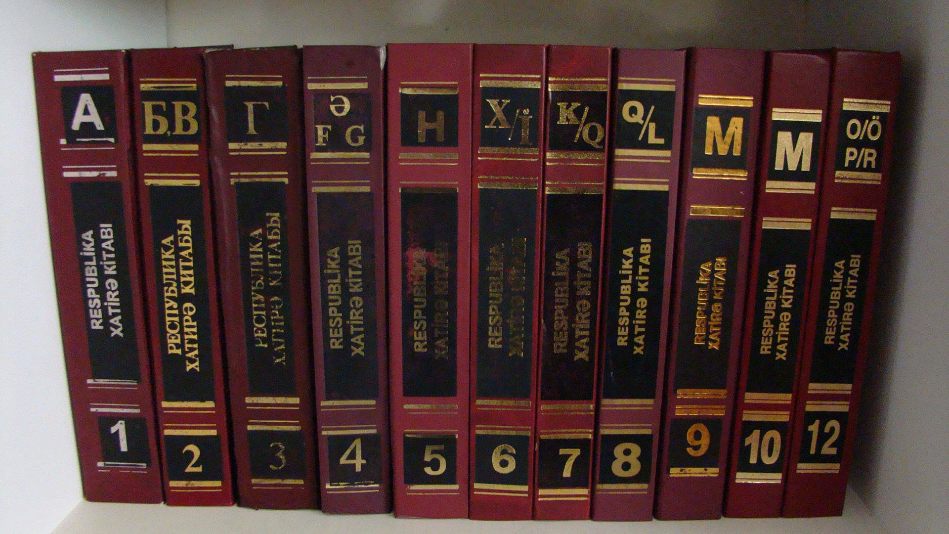 Azərbaycan Respublikası Xatirə Kitabı — İkinci dünya müharibəsində, müharibədən sonrakı hərbi münaqişələrdə, Əfqanıstan və Qarabağ müharibələrində şəhid olmuş azərbaycanlılarla bağlı yaddaş kitabı.